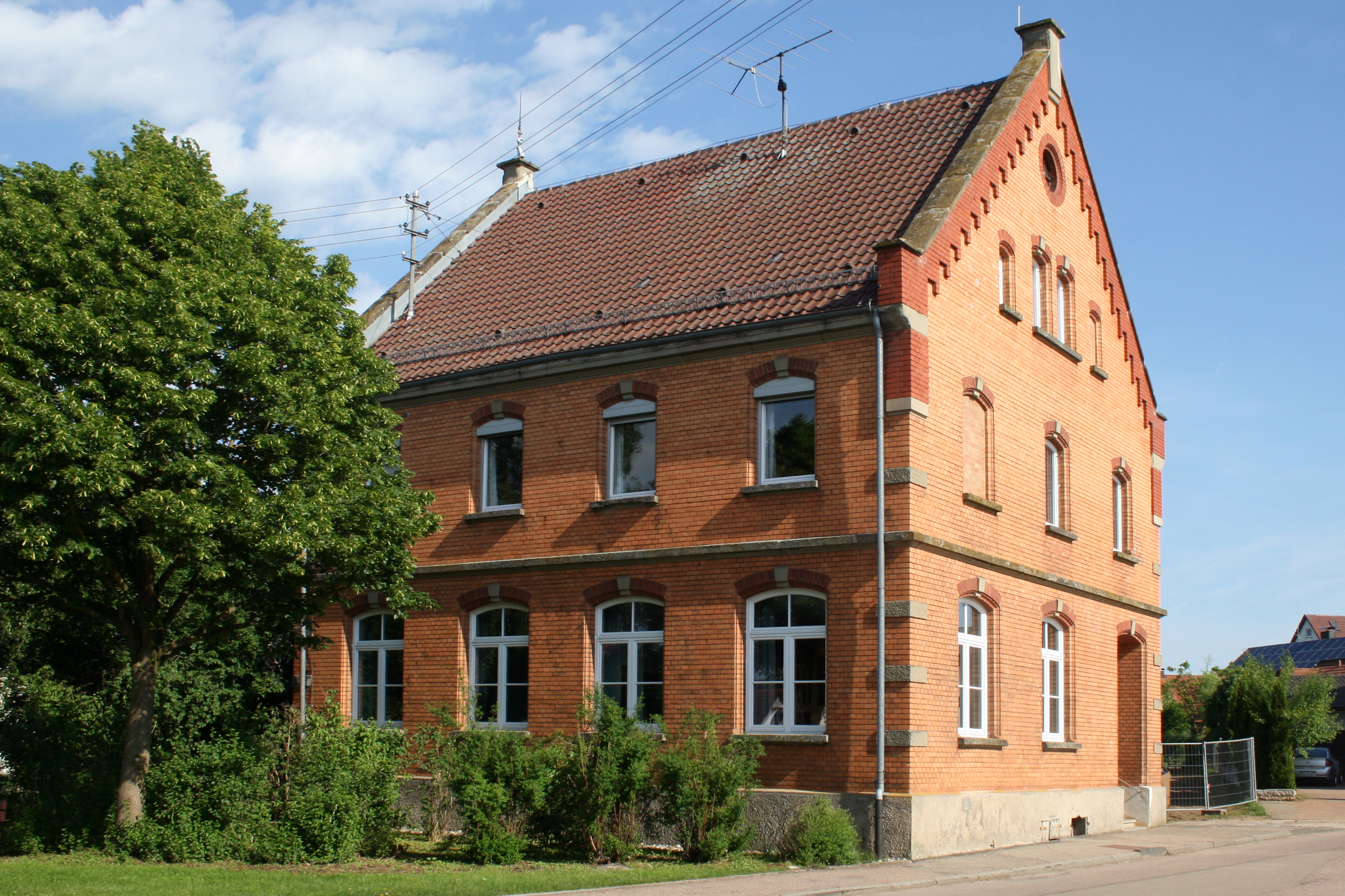 Rotes Schulhaus in Pfahlheim: ehemalige Schule, seit 1995 Kindergarten.